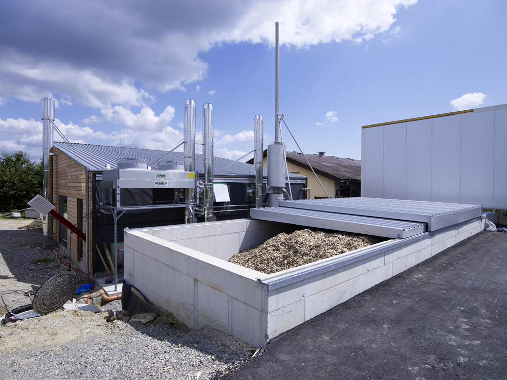 Heizzentrale (BHKW) und Hackschnitzelsilo in Lippertsreute